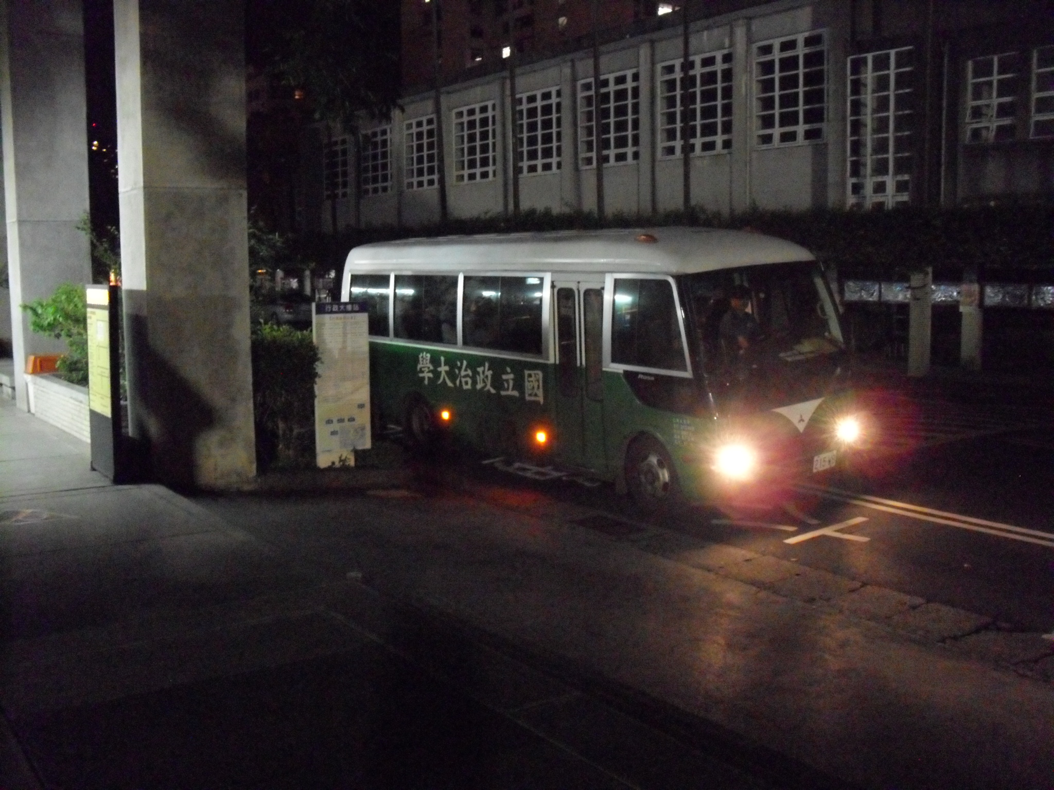 Bân-lâm-gú: 國立政治大學的校園公車215-WB夜景。學生已經排隊上車，車應該是欲開去山頂的宿舍。看in網站的說明，講拜六、禮拜的時陣是in的公務車咧駛，教職員是免費，對下早仔八點到暗時十點，隔二十分鐘有一班車。